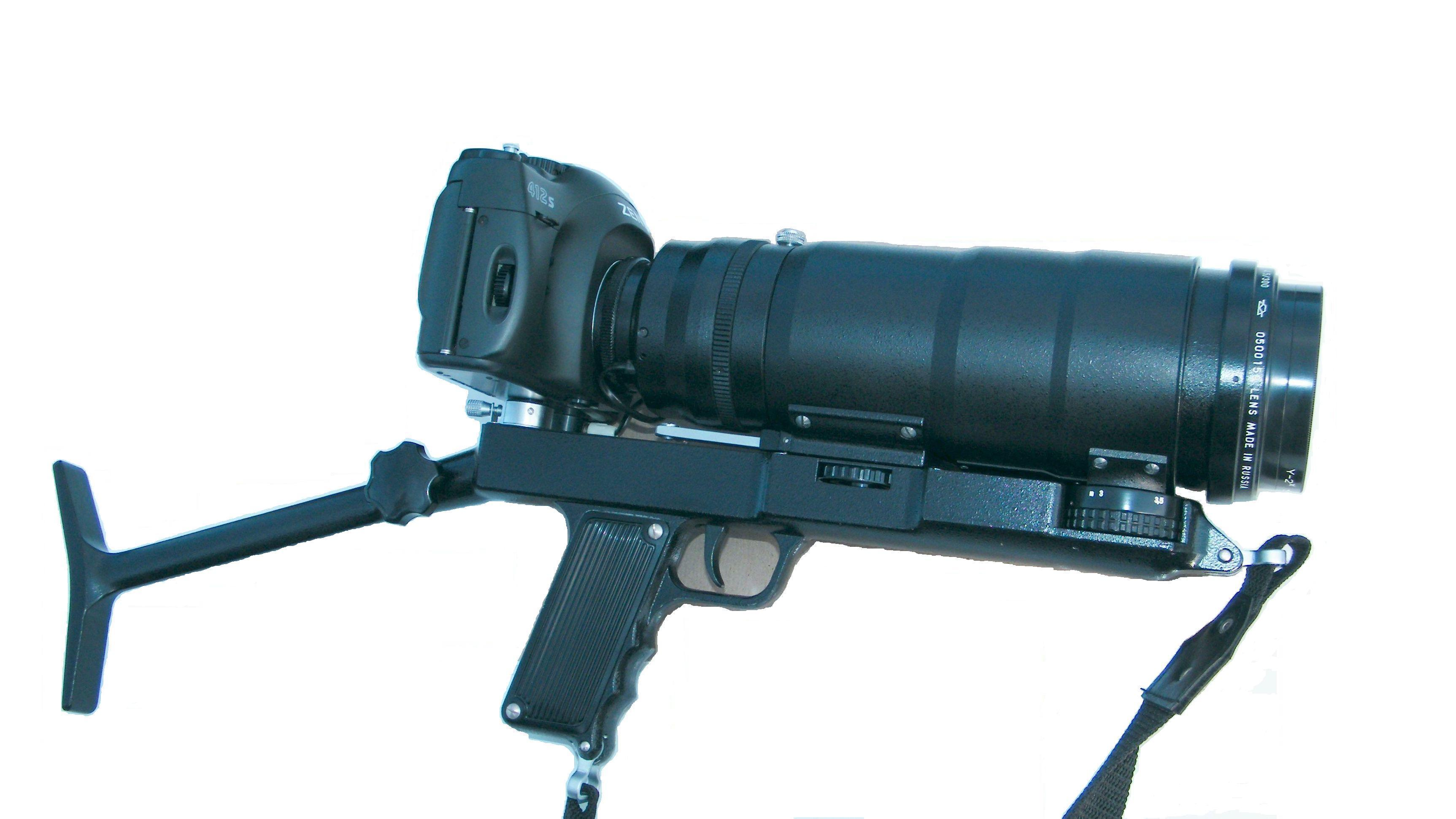 Фоторужье Зенит-412C